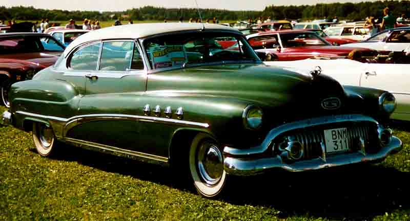 1951 Buick Roadmaster Series 70 Model 76R 2-door Hardtop